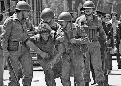 Represión en San Cayetano en el acto convocado por la CGT-Brasil conducida por Saúl Ubaldini